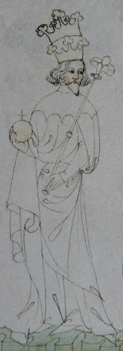 Václav II.